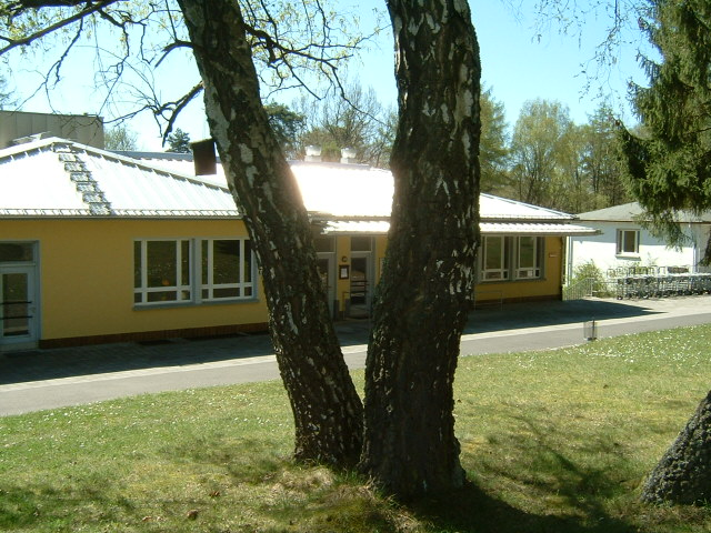 Das Kinderdorf Wegscheide ist das Schullandheim der Stadt Frankfurt am Main , im Bereich der Stadt Bad Orb. Dort wird auch Unterricht abgehalten. Hier: Küche und Essensausgabe.